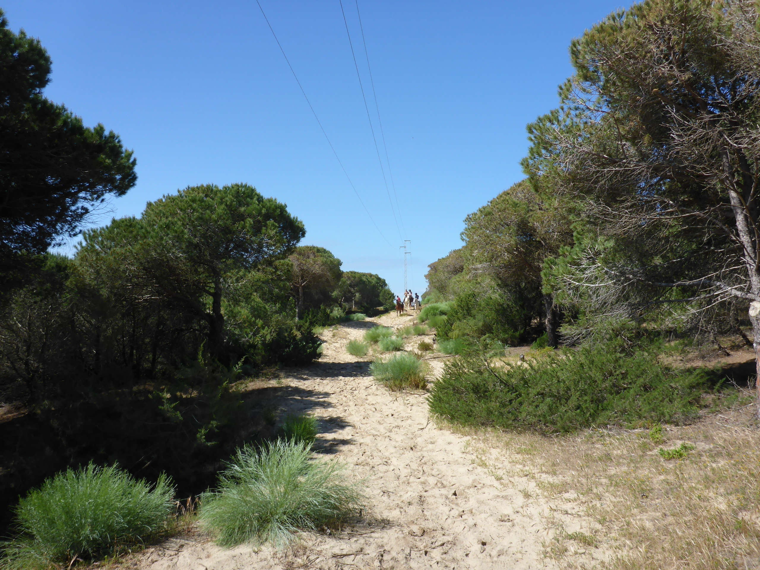 Pinar del Valdevaqueros - Tarifa (España)